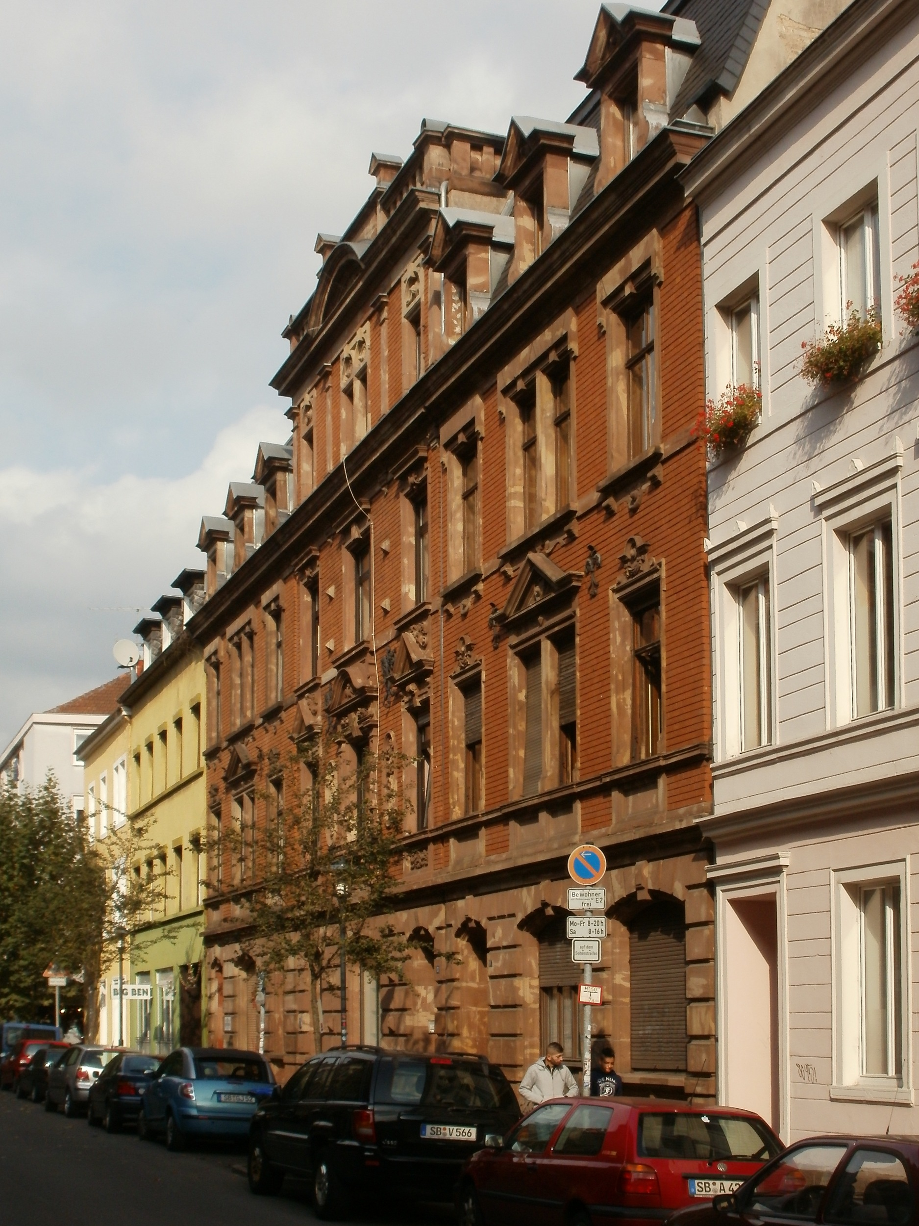 Försterstraße 11/13/15 (Saarbrücken)